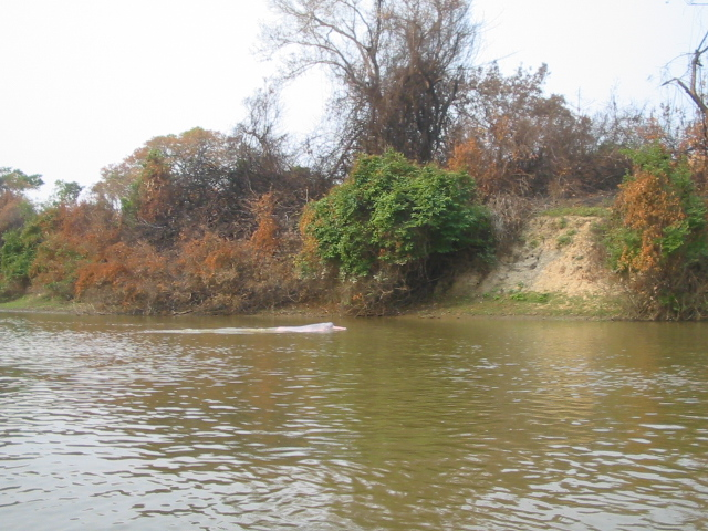 Dauphin rose bolivie, rurenabaque(environ)